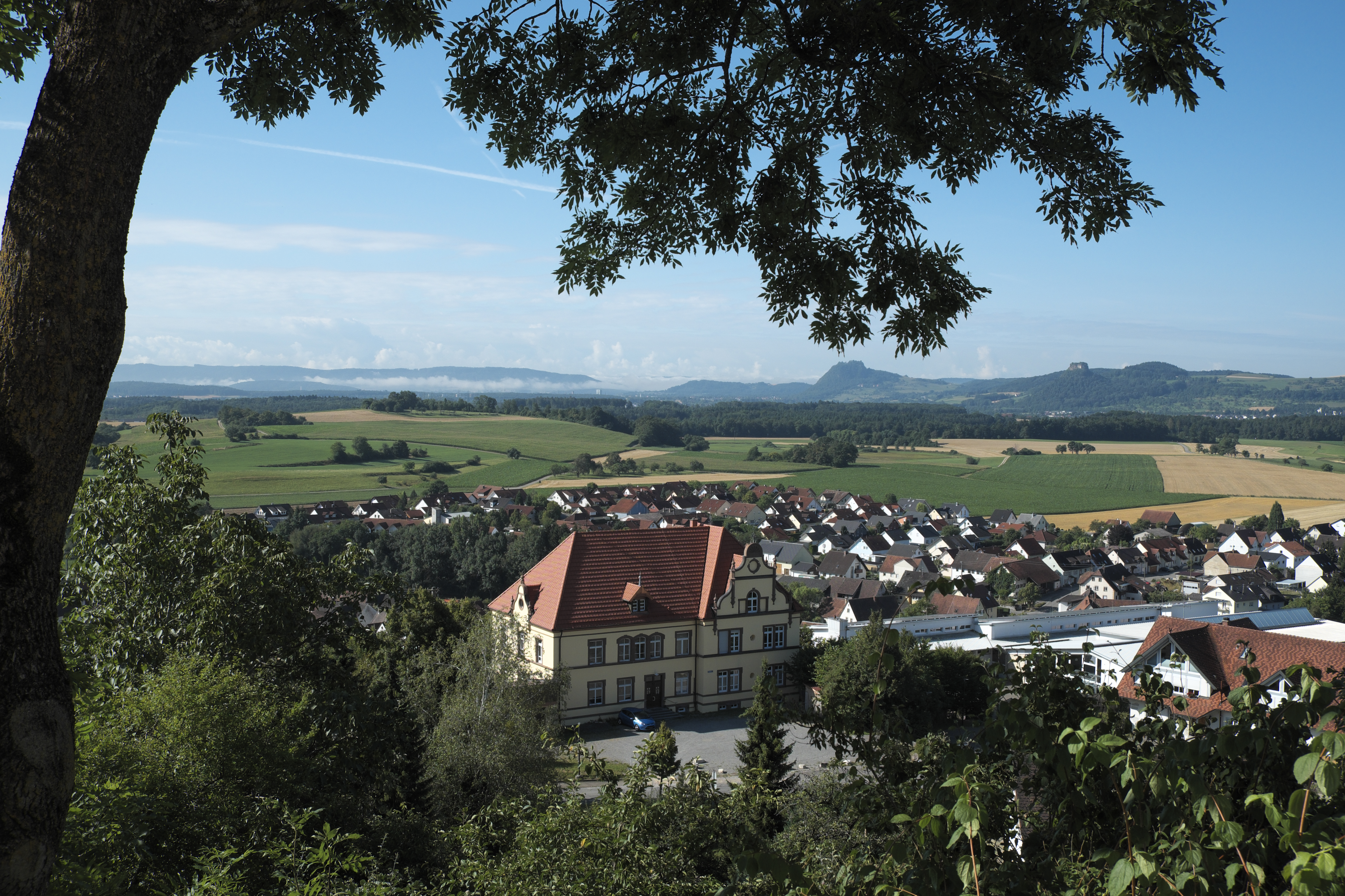 Aach (Hegau) im Landkreis Konstanz (Baden-Württemberg/Deutschland)